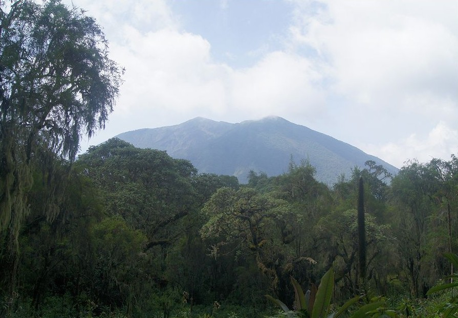 Вулкан Бисоке, горы Вирунгу, Руанда Volcano Visoke, Virunga volcanoe NP